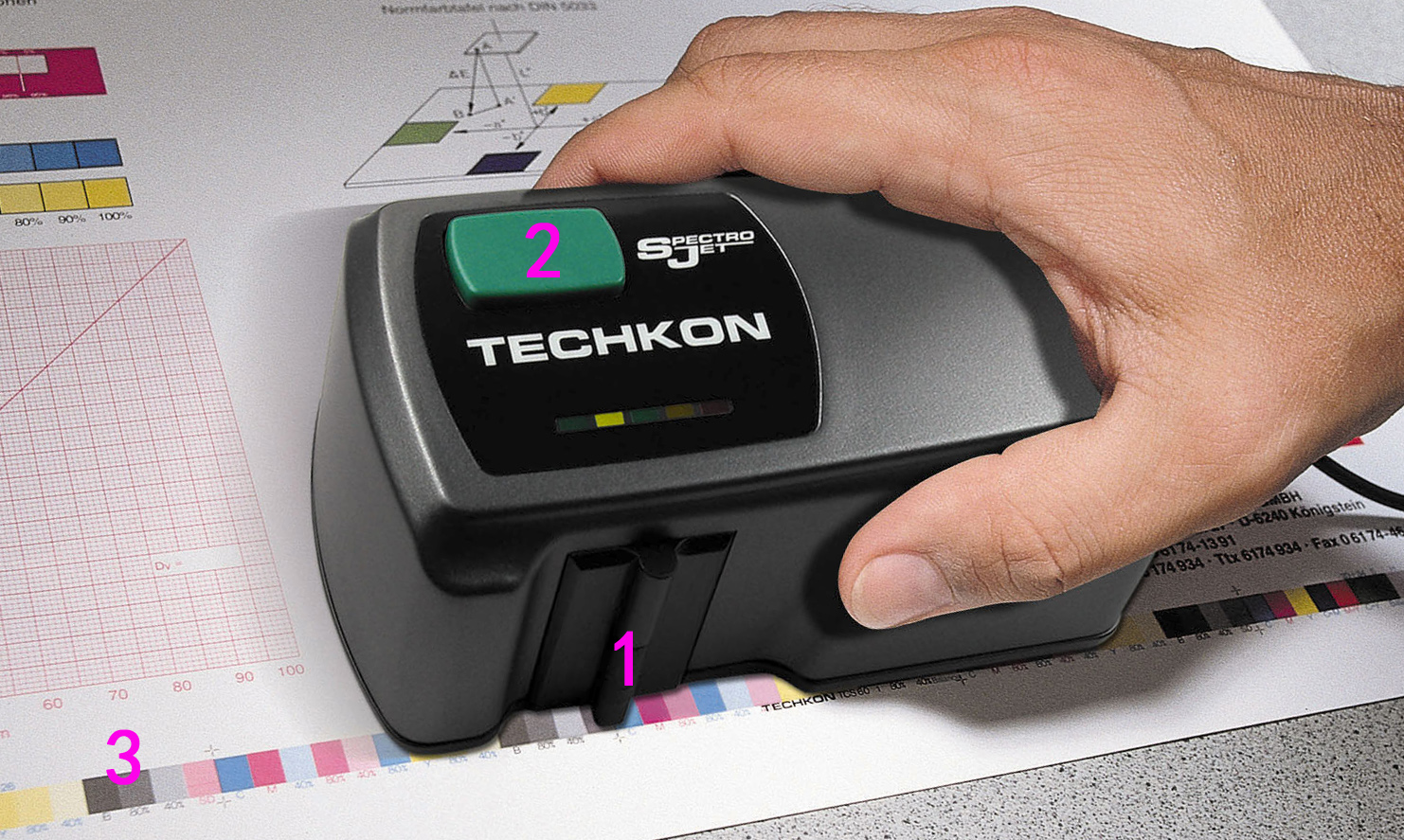 Handgeführtes Scan-Spektraldensitometer. Der Messkopf (1) wird dicht über der Papieroberfläche bewegt. Das Gerät fährt dabei auf exakt ausgerichteten Rollen, sodass auch schmale Druckkontrollleisten (3) sogar ohne Führungsschiene gescannt werden können. Aufgesetzt vor dem ersten Messfeld der Druckkontrolleiste, wird die Messung per Taste (2) ausgelöst. Position und Art des jeweiligen Messweldes werden automatisch erkannt.